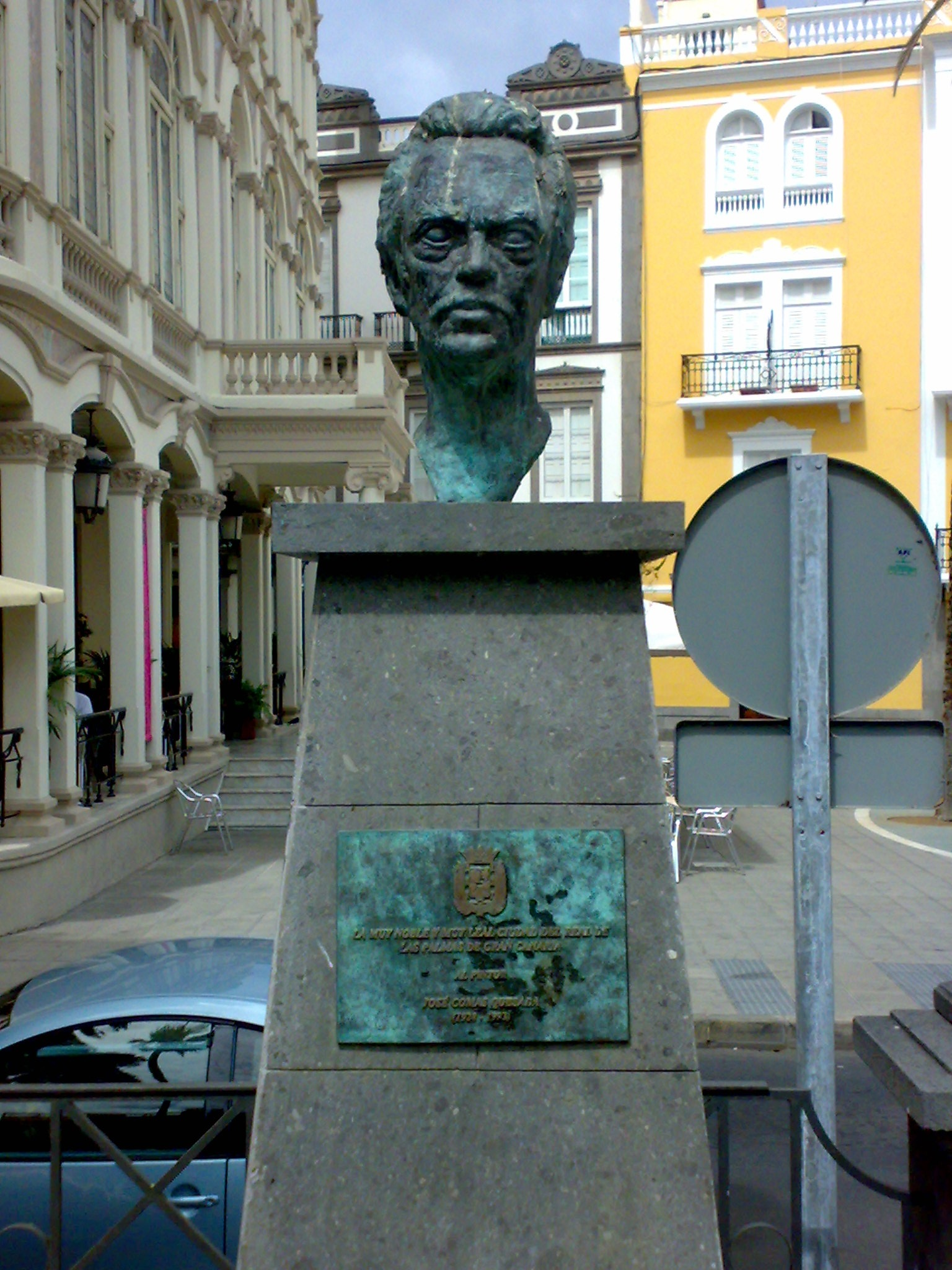 Monumento dedicado al célebre acuarelista en la Alameda de Colón de Las Palmas de Gran Canaria. Obra del escultor José Perera Valido (1995). La inscripción de la placa dice lo siguiente: "La muy noble y muy leal ciudad del Real de Las Palmas de Gran Canaria. Al pintor José Comas Quesada. 1928-1993."